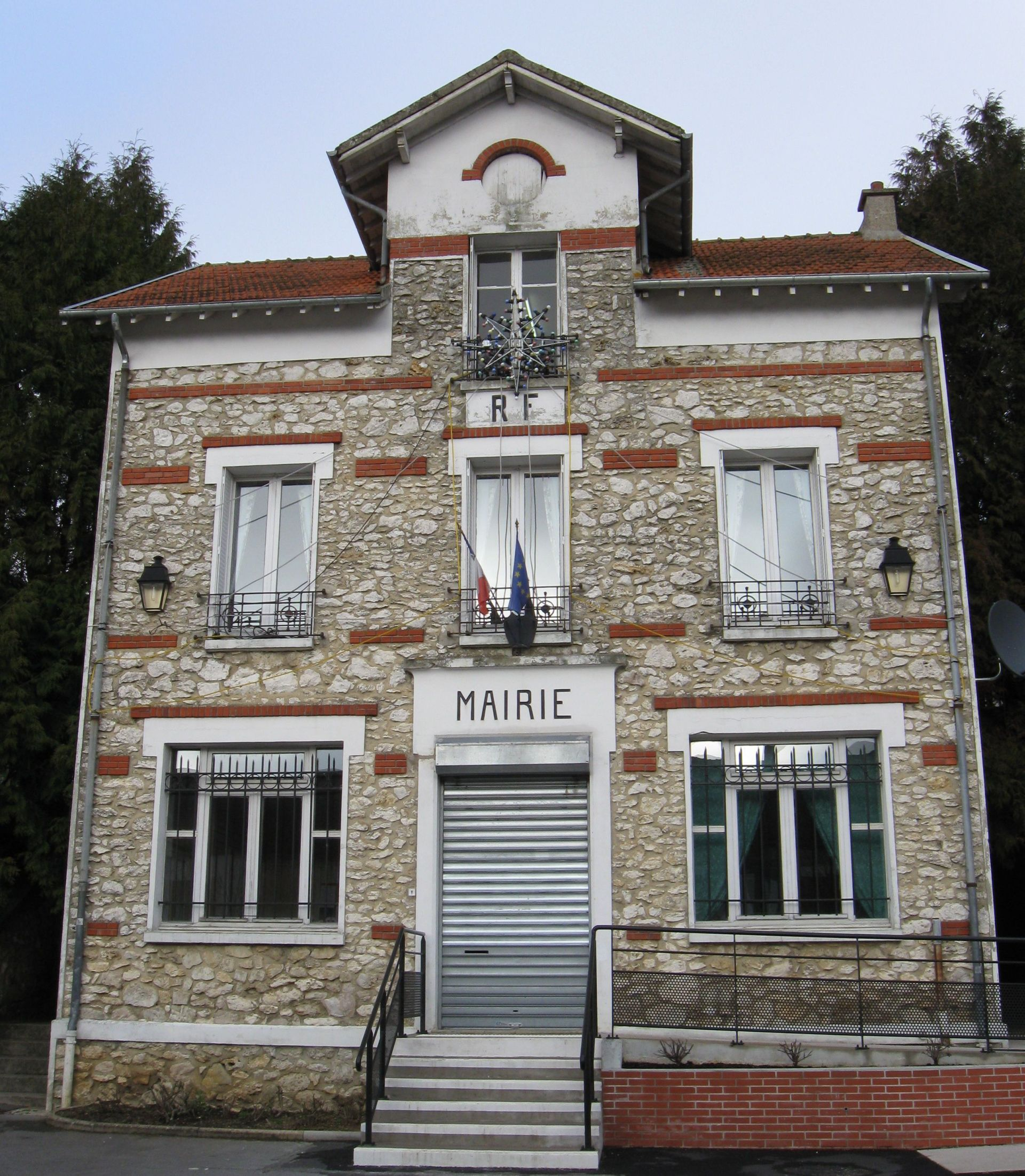 Mairie de Meilleray (département de la Seine et Marne, région Île-de-France).